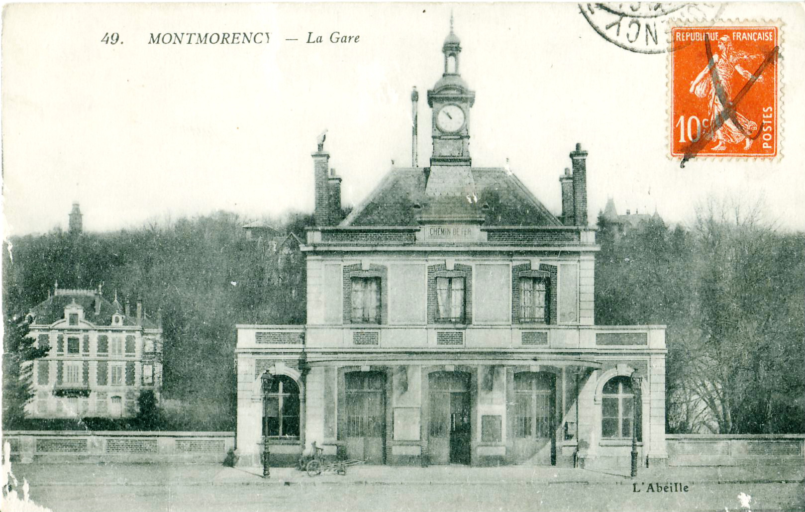 Carte postale ancienne éditée par Abeille, n°49 :MONTMORENCY - La Gare du Refoulons